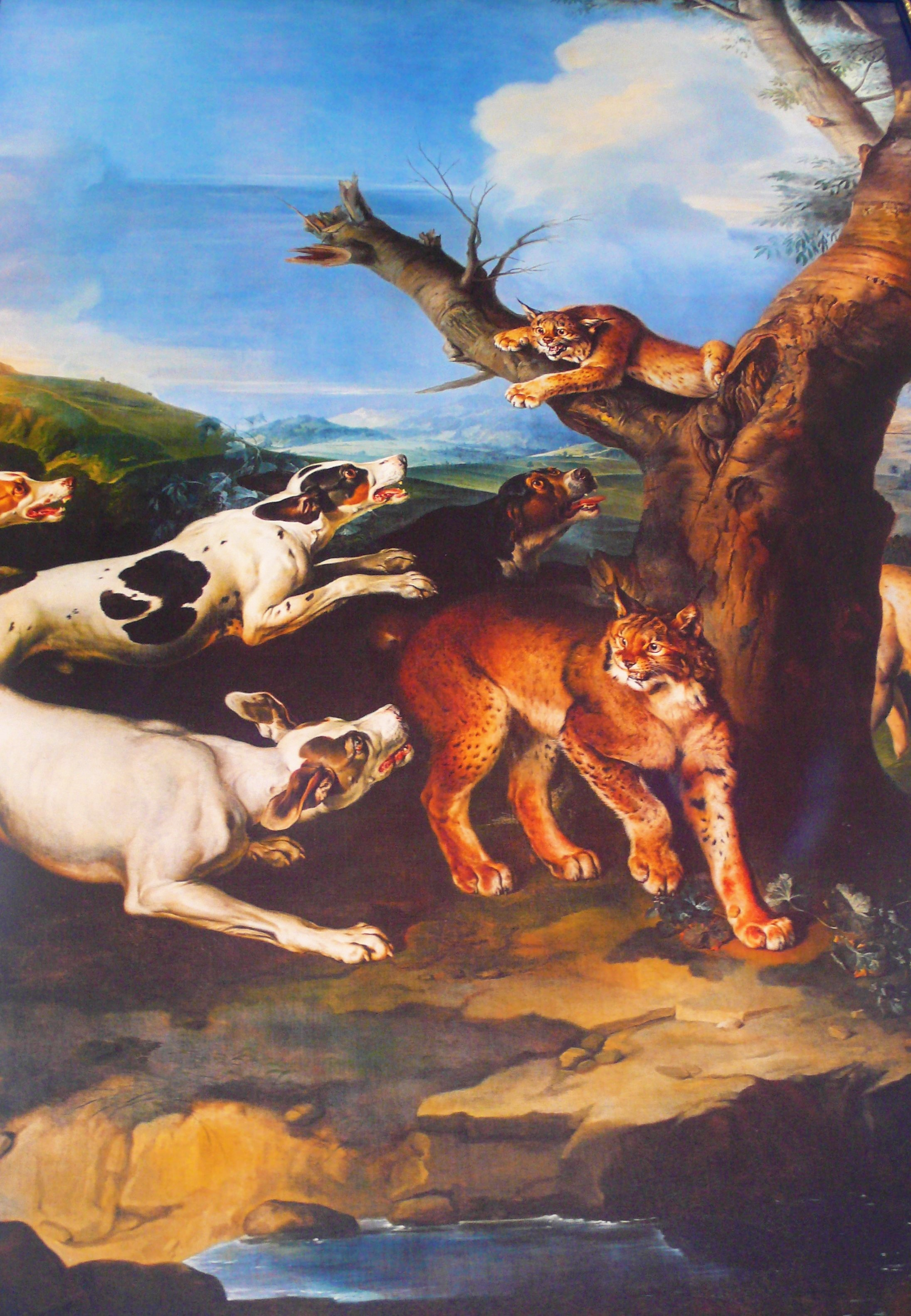 detail obrazu Štvanice na rysy od Johanna Georga de Hamiltona